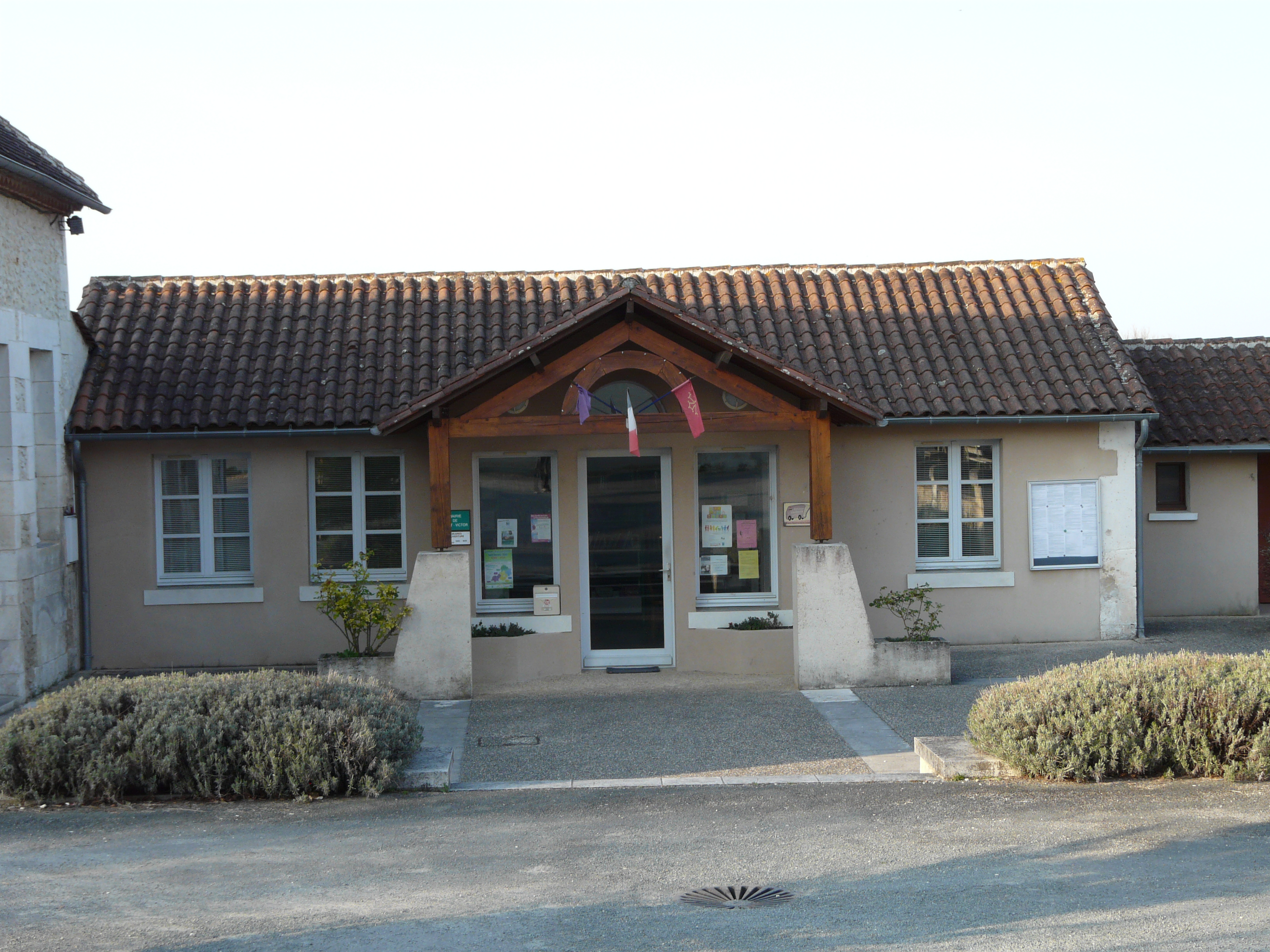 La mairie de Saint-Victor, Dordogne, France.